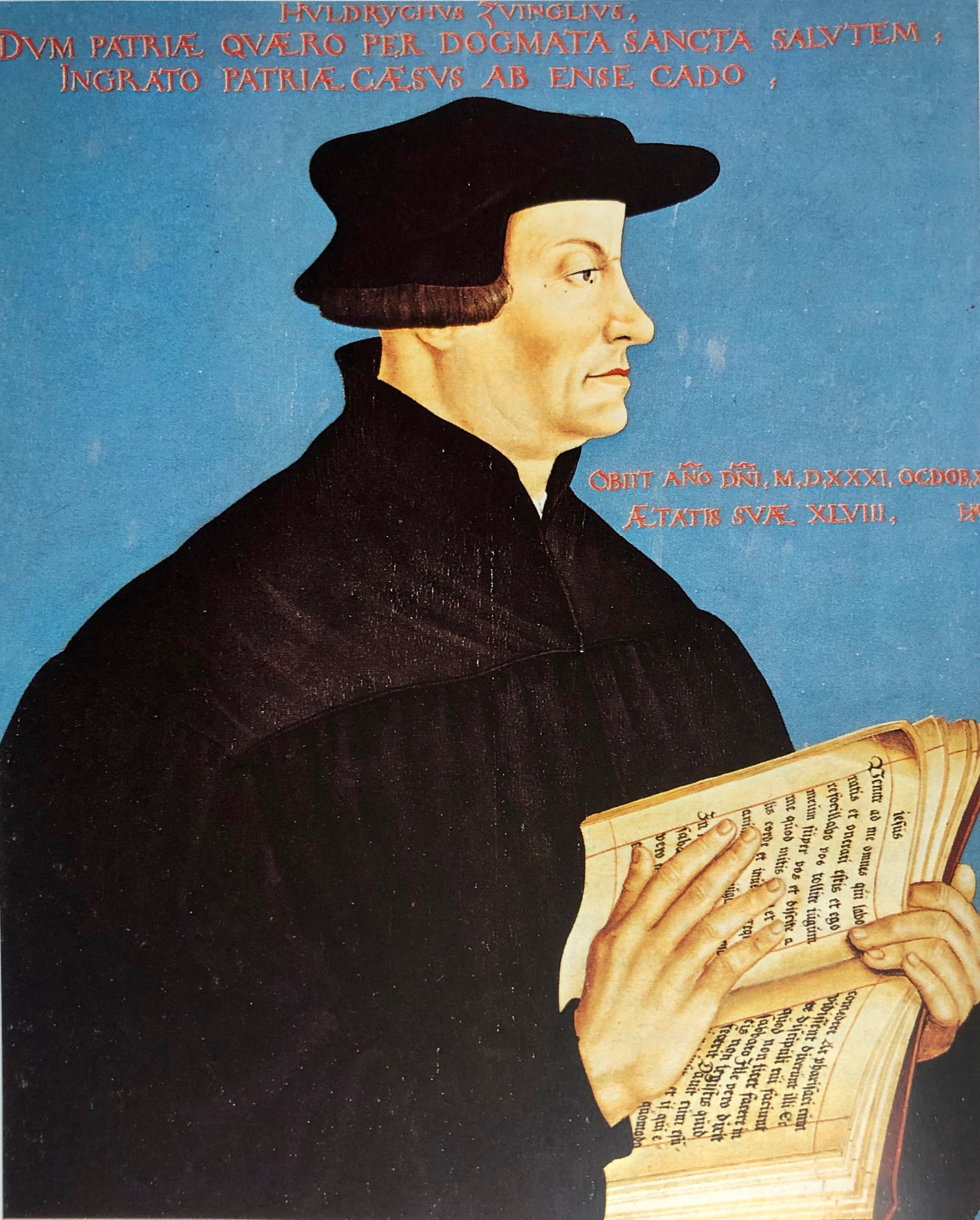 Der Zürcher Reformator Ulrich Zwingli auf einem Porträt von Hans Asper, 1549